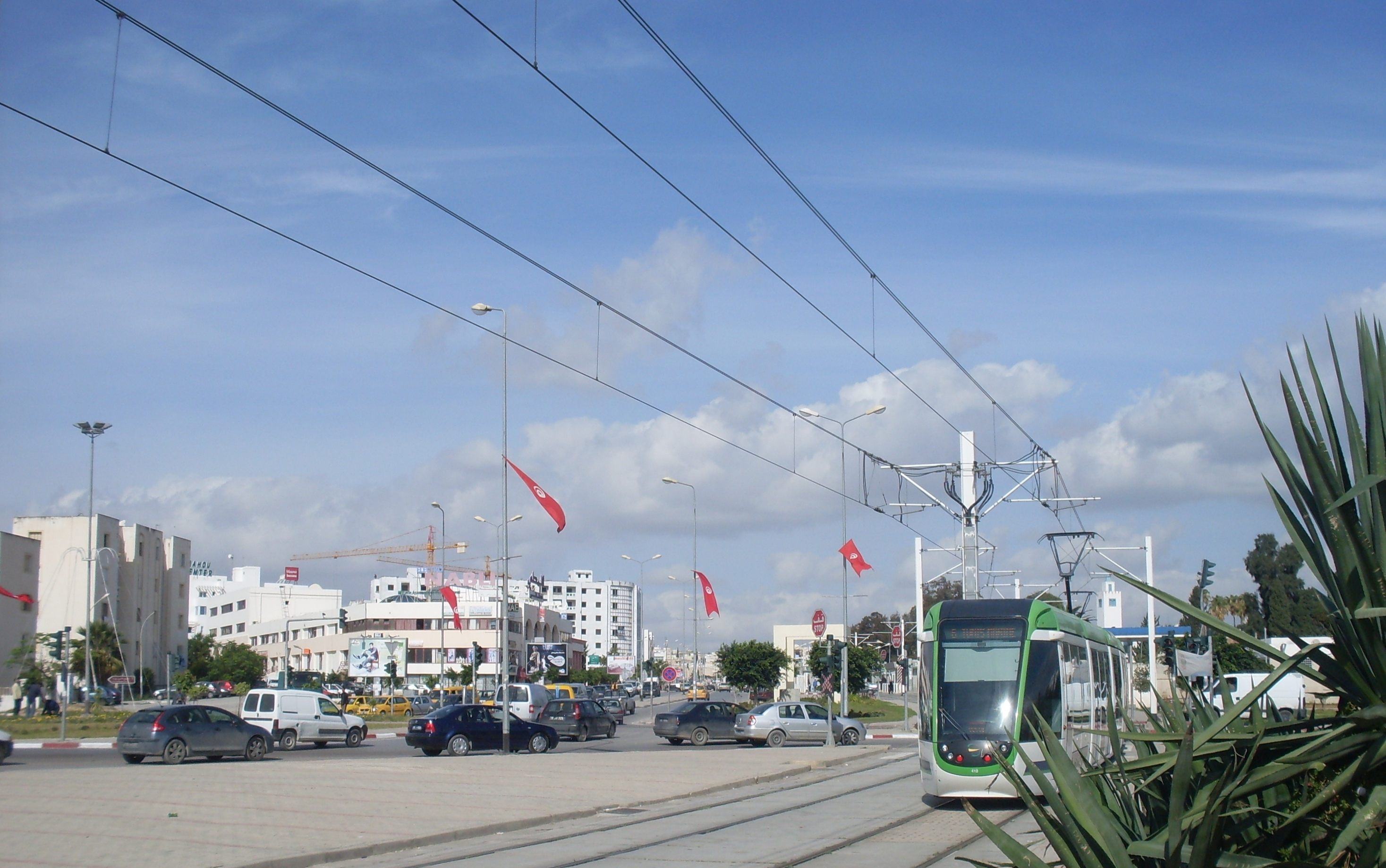 Avenue principale à el Mourouj 1